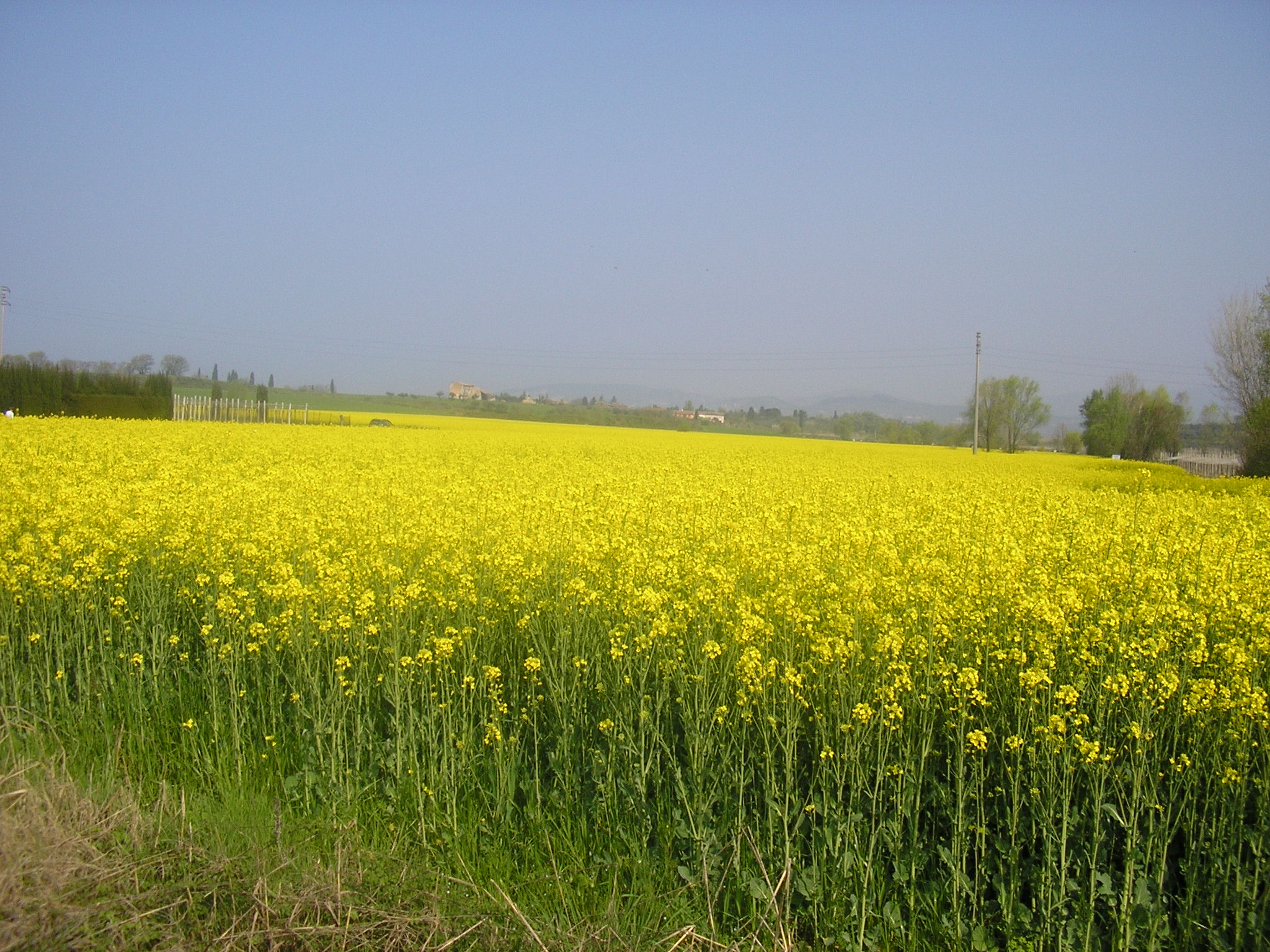 Campo coltivato a Colza (Brassica napus); Lazise (Italia)